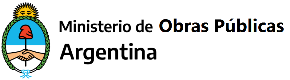 Ministerio de Obras Públicas